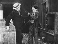 fotografía de la película The New Janitor de 1914 de Charlie Chaplin